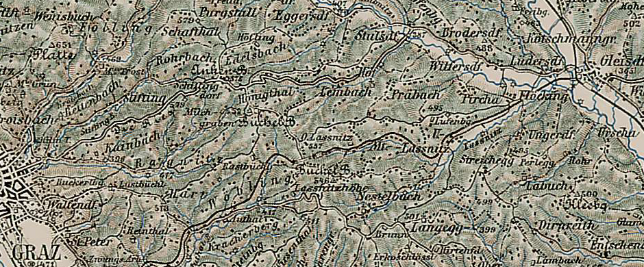 Das Laßnitztal zwischen Graz und Gleisdorf